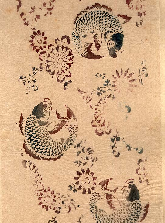 Japanische Schablone 1890